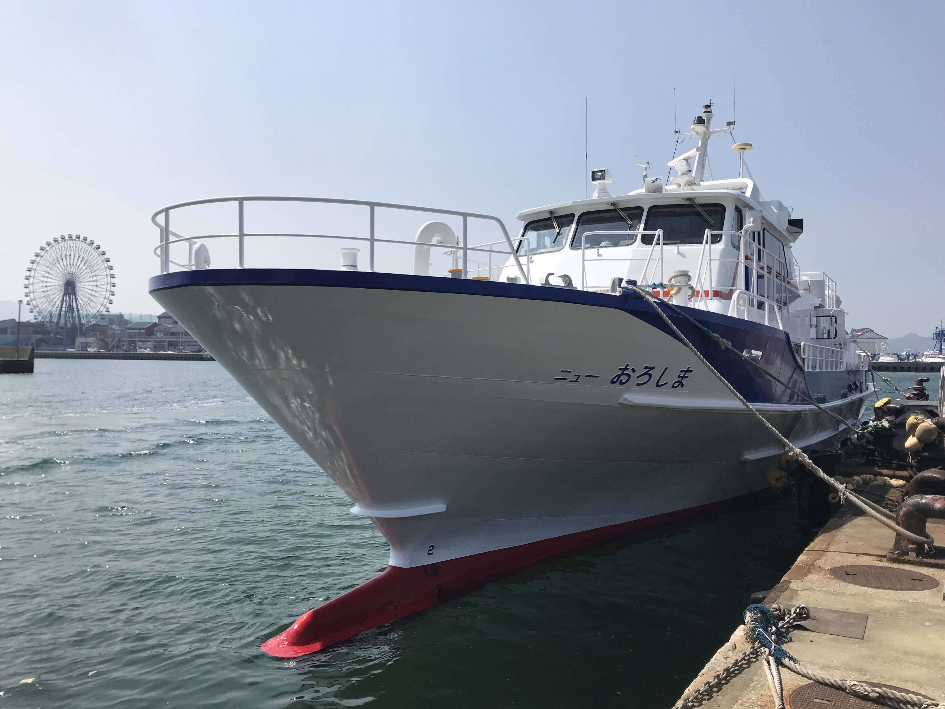 姪浜港にて停泊中の小呂島行き福岡市営渡船「ニューおろしま」